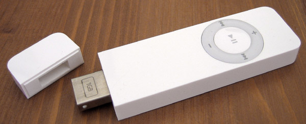 Foto van eerste generatie iPod Shuffle